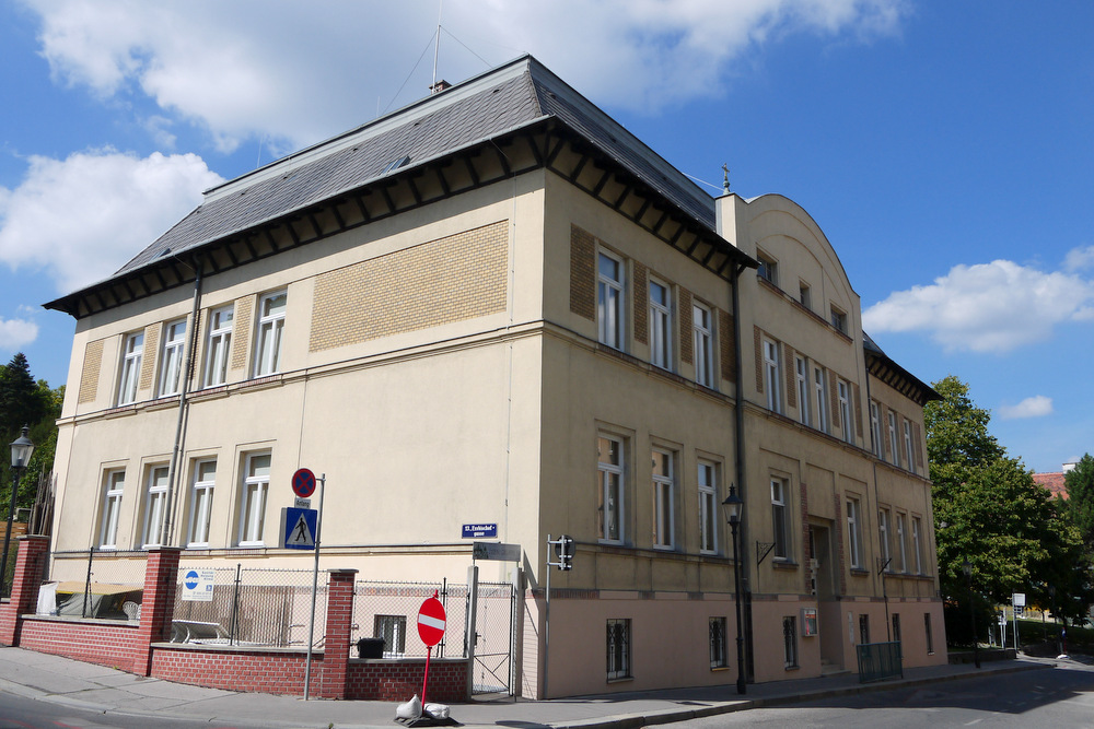 Elisabethinum, wurde 1905-1906 Kinderbewahranstalt „Elisabethinum“ von Johann Wolf erbaut.